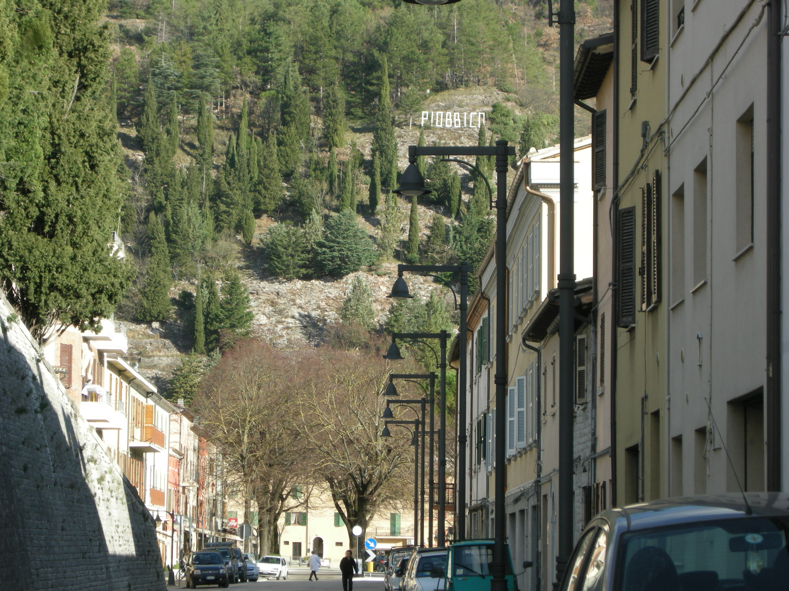 Piobbico, view